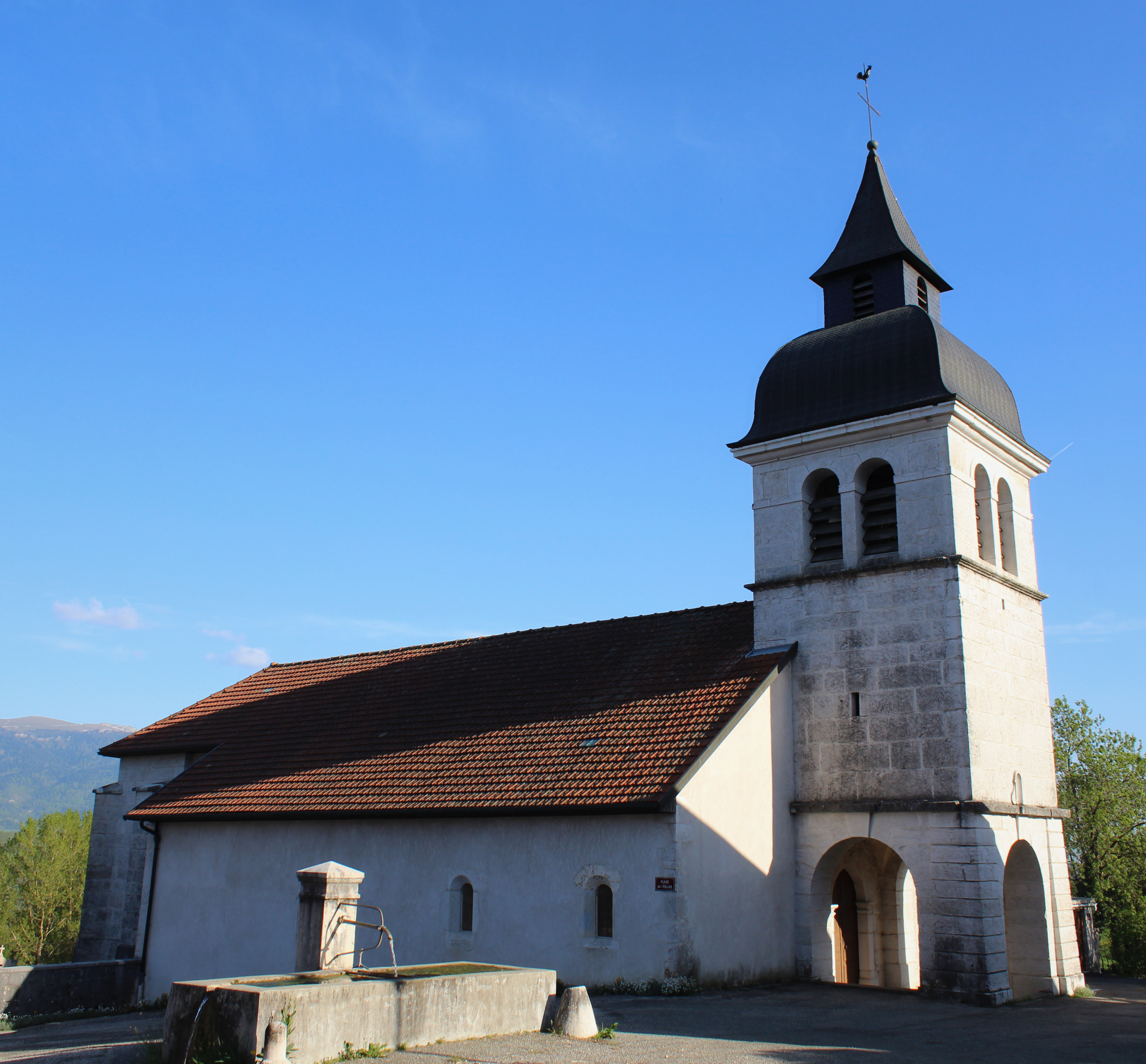 Église Saint-Michel de Lompnieu.